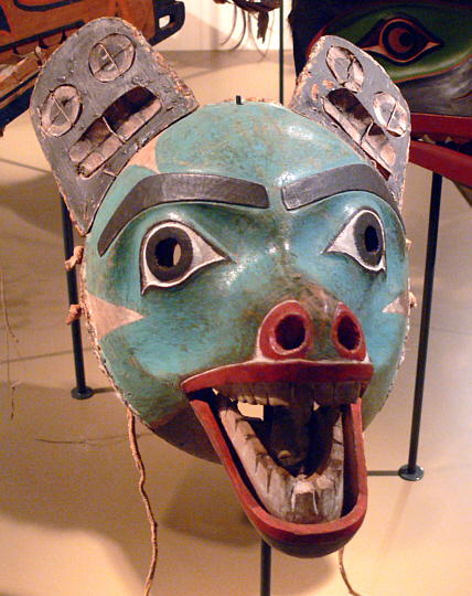 Wolfsmaske der Haida, um 1880 Collection: Ethnologisches Museum, Berlin-Dahlem